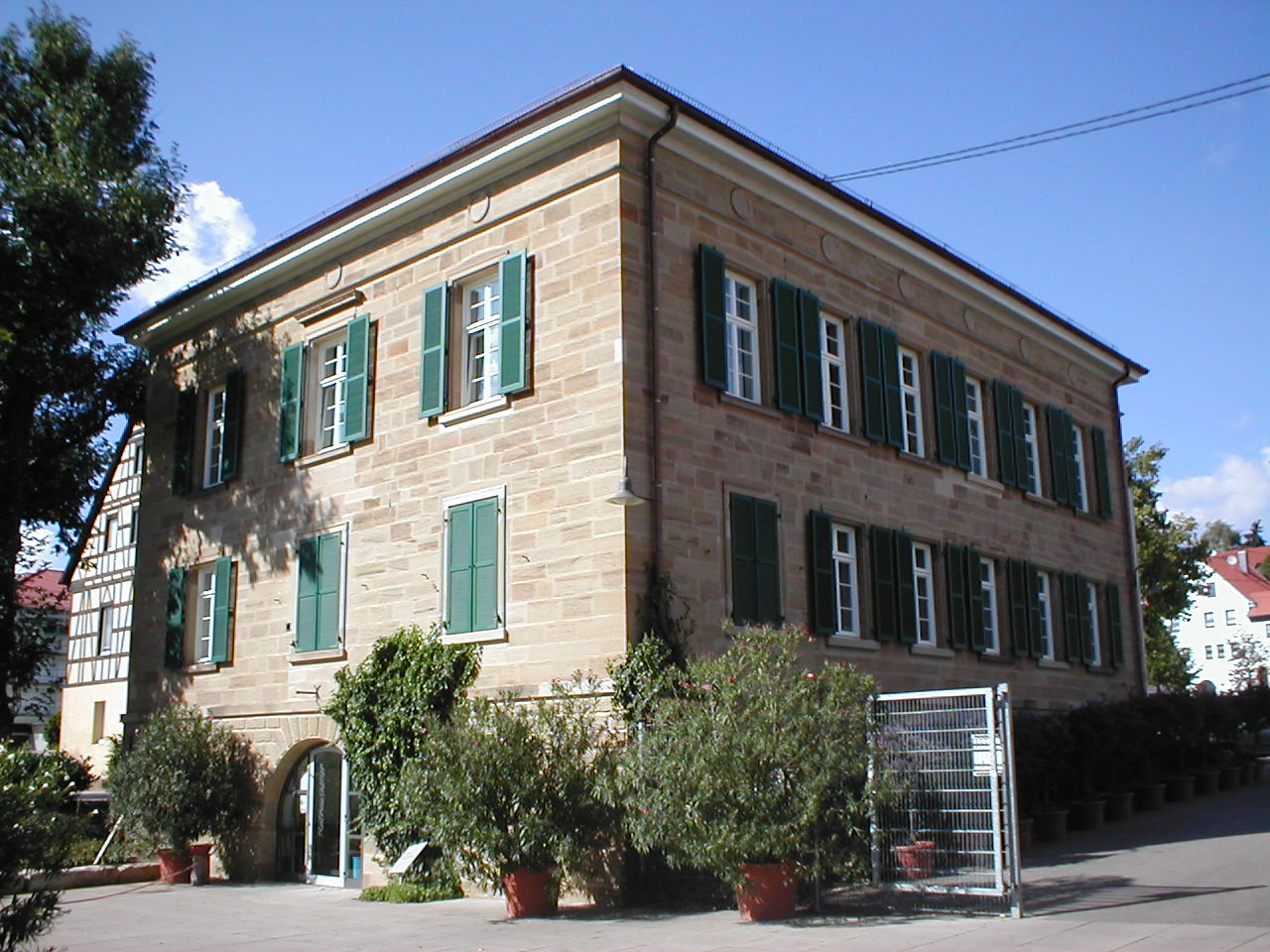 Rathaus in Nordheim, erbaut 1854 von Wilhelm von Seybold, Umbau zum Verwaltungssitz 1963/64, Rathaus seit 1964